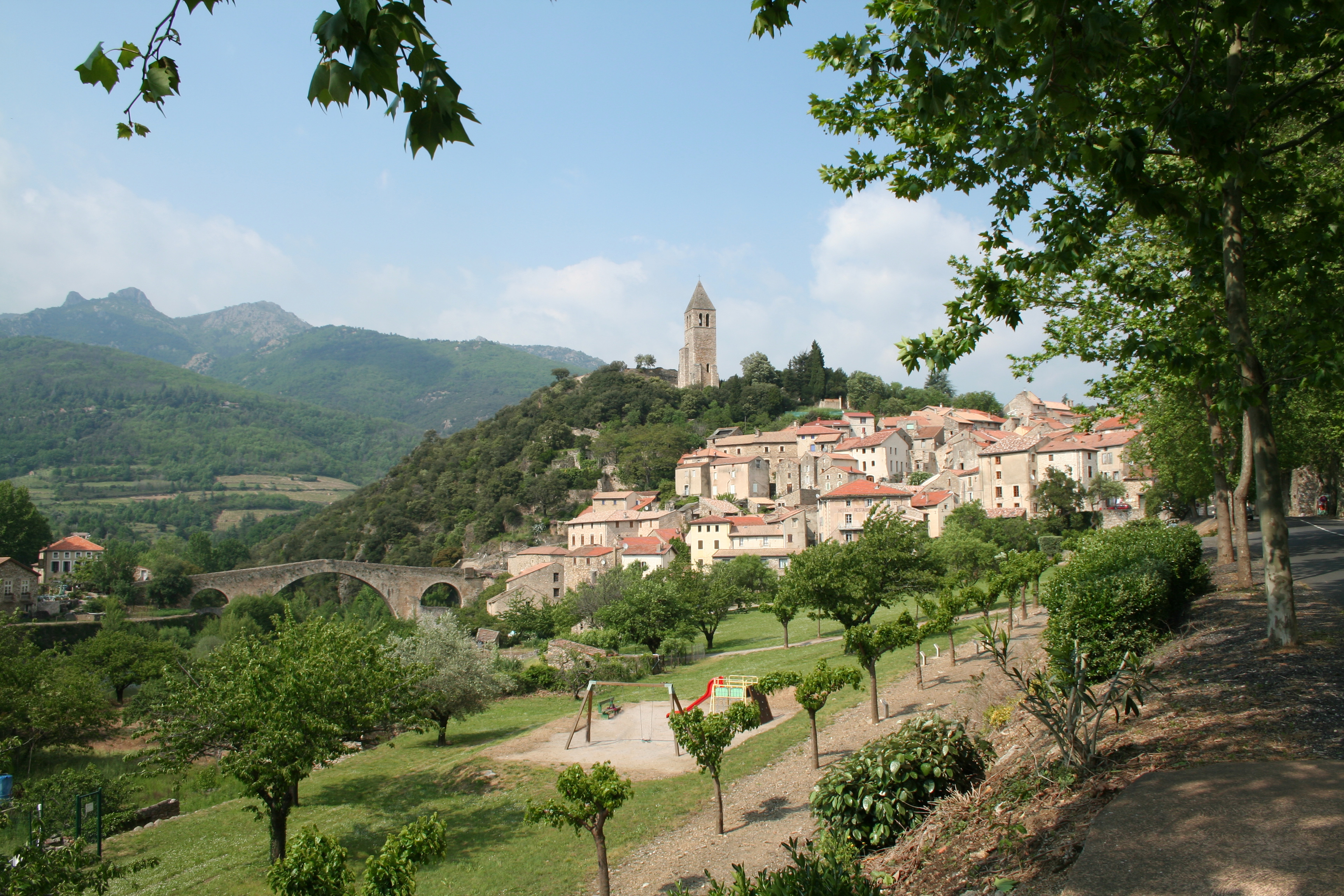 Olargues (Hérault) - vue générale. Le pont vieux et la tour.